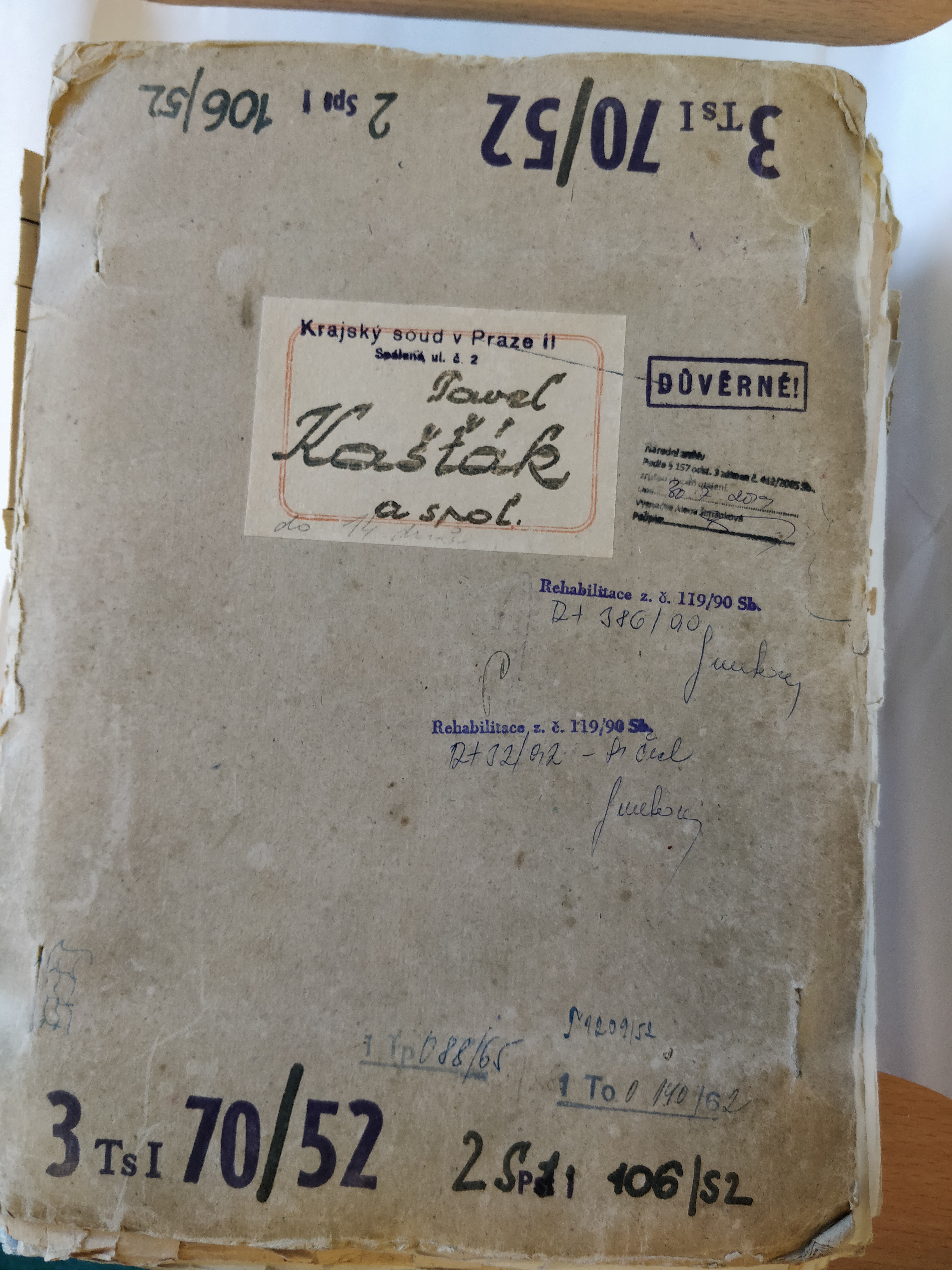 Obal spisu Státního soudu 3 TsI 70/52 soudního řízení, vedeného proti odbojové skupině Pavla Kašťáka, označované jako "velezrádci a špioni z Jilemnicka". Pořízeno v badatelně Národního archivu, pracoviště Chodovec.